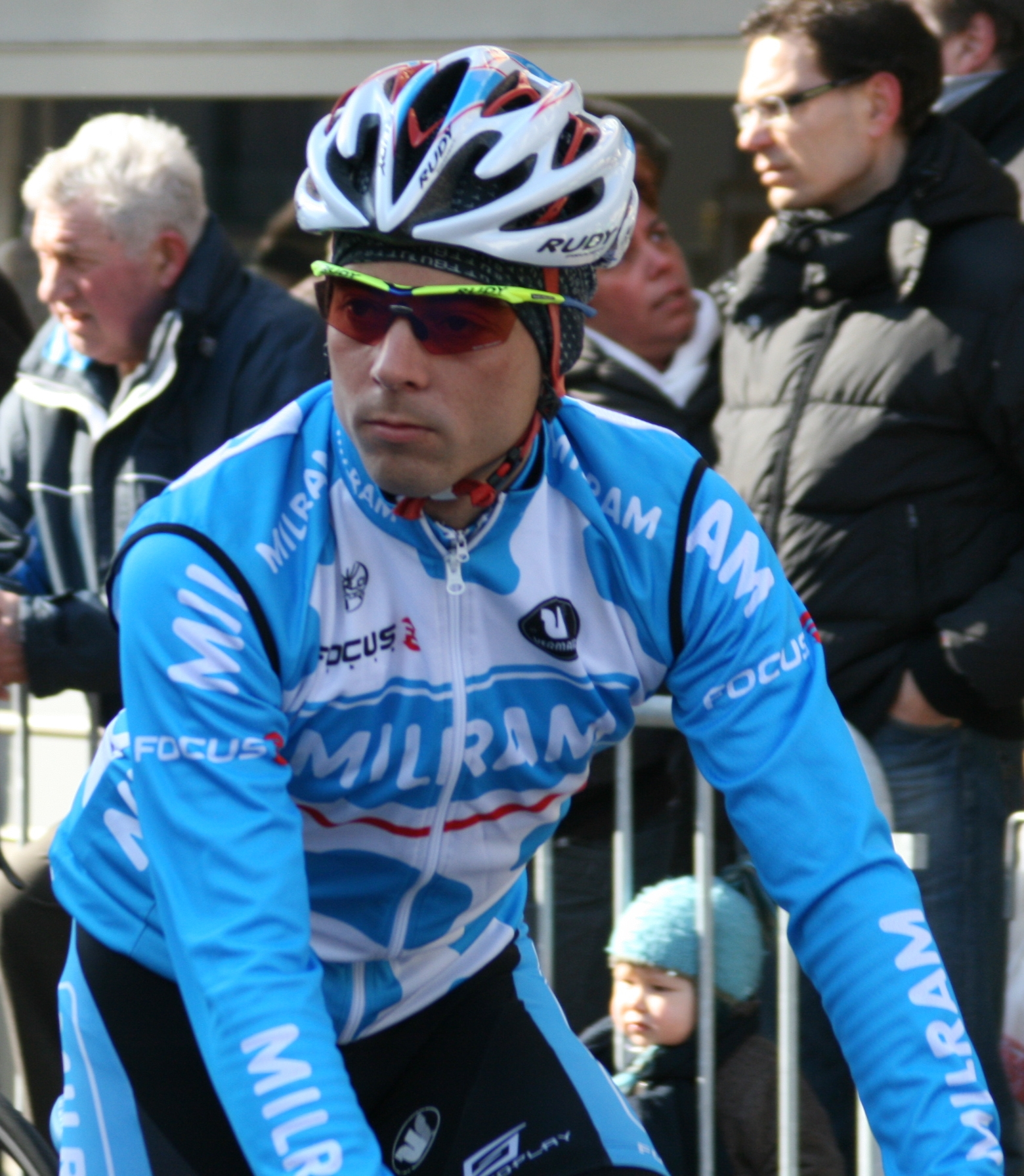 Matthias Russ lors des Trois jours de Flandre occidentale 2010